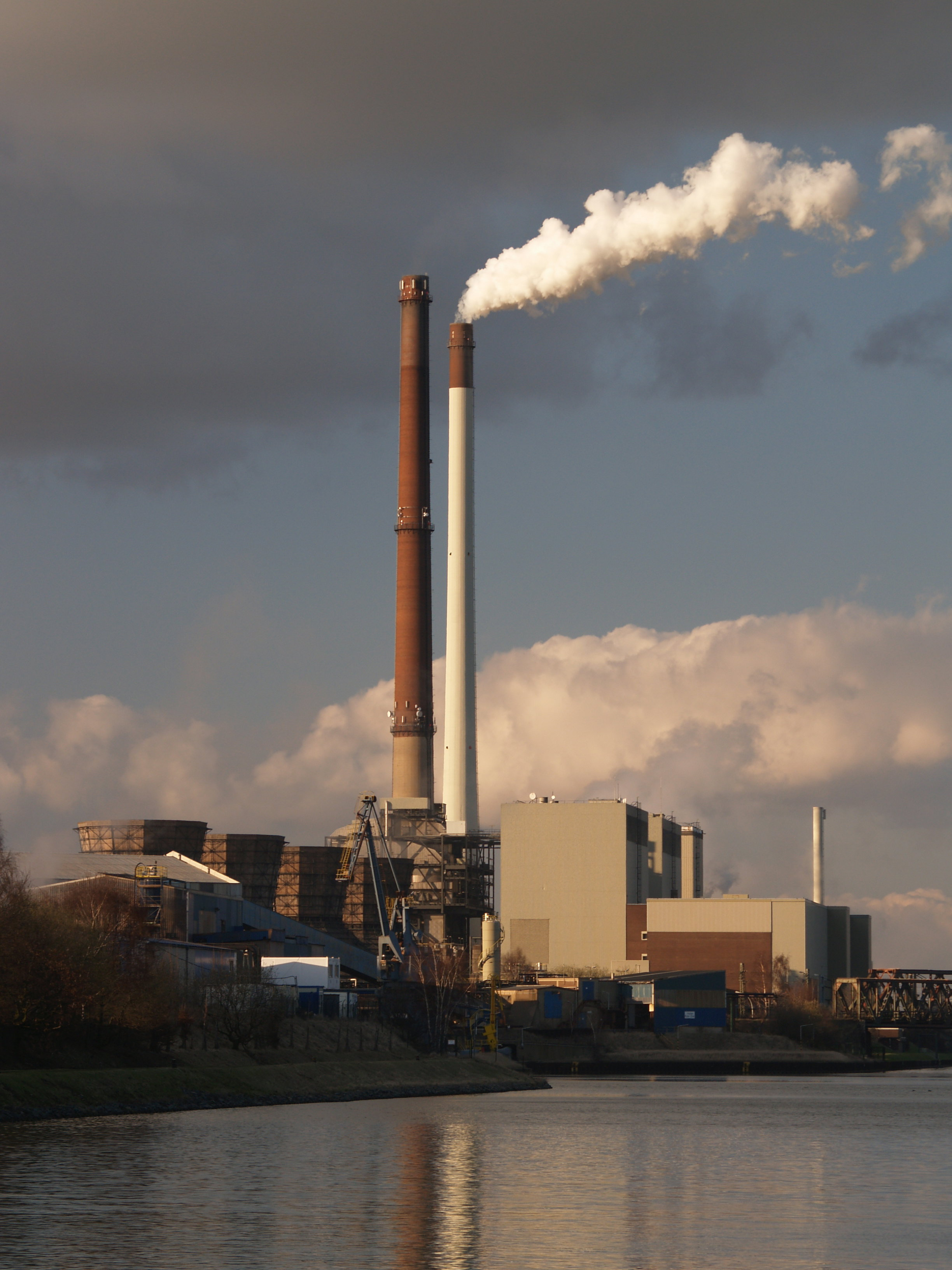 Coal power plant in Datteln (Germany) at the Dortmund-Ems-Kanal